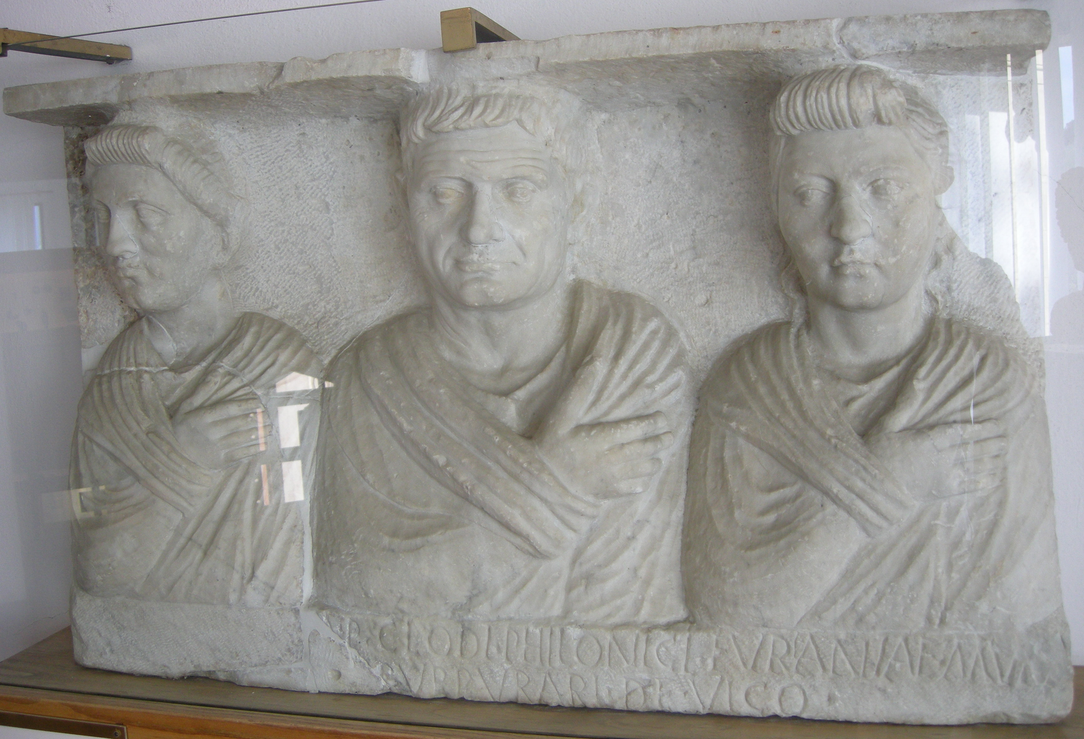 Rilievo funerario di Publius Clodius Philonicus, 70-100 dc. Museo archeologico di Fiesole.